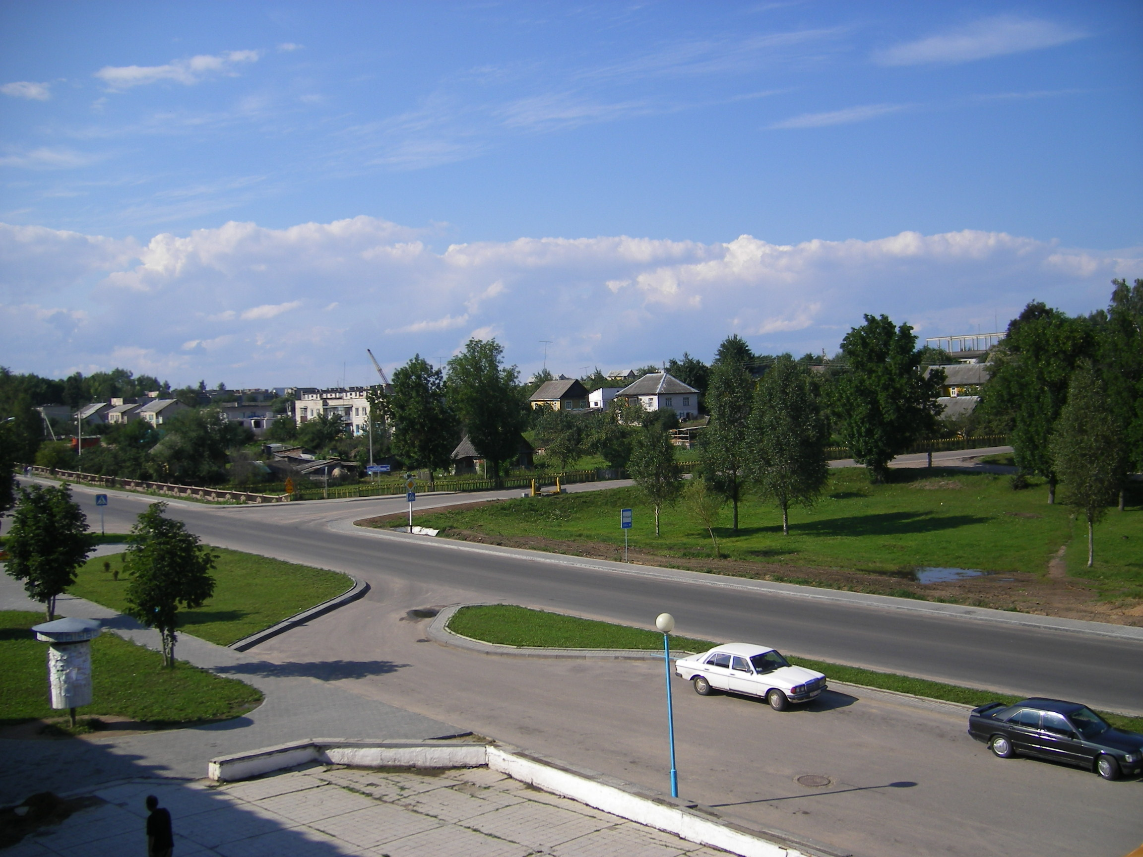 Karelichy, ul. Gagarina